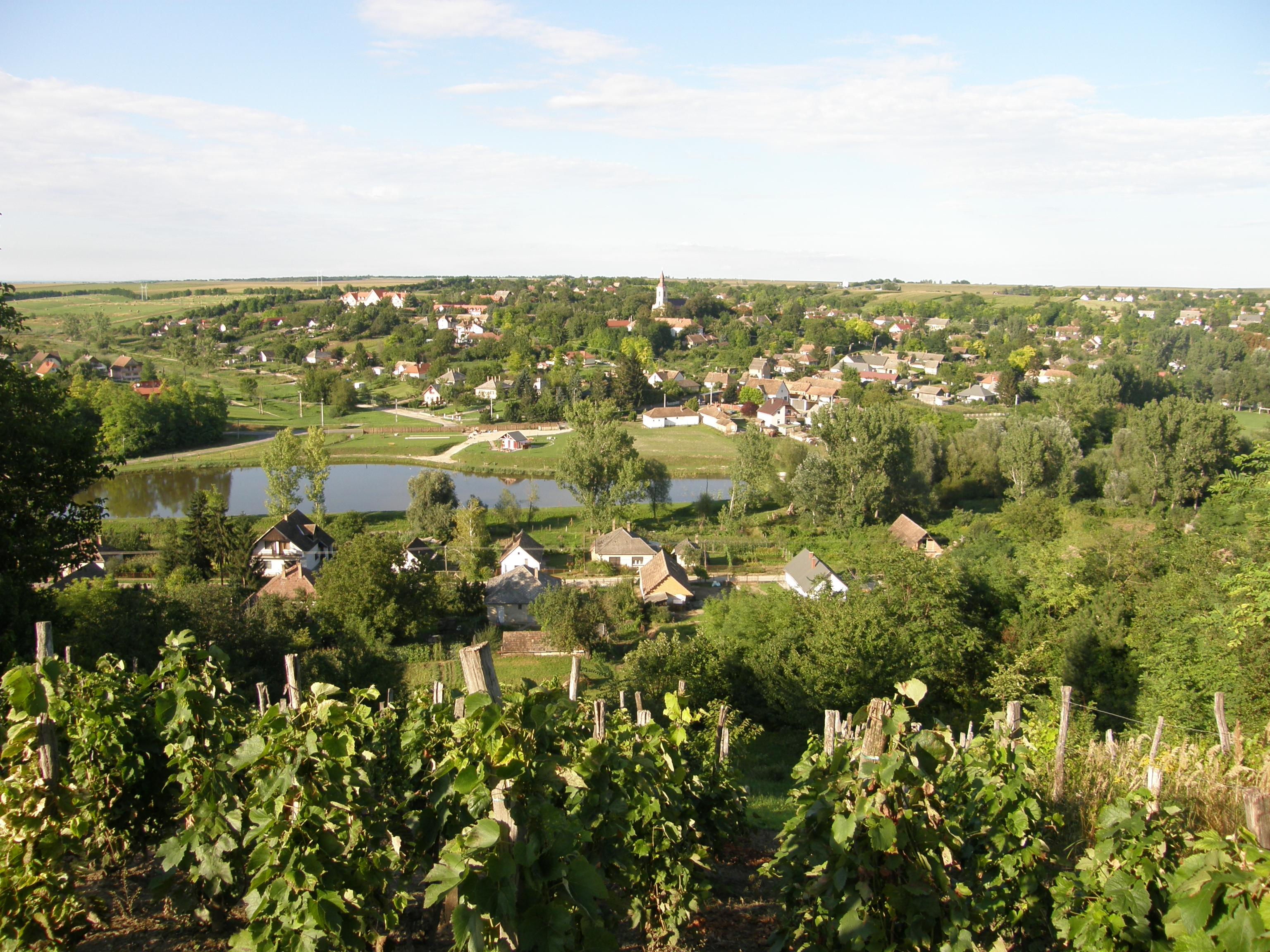 Nagyberény látképe